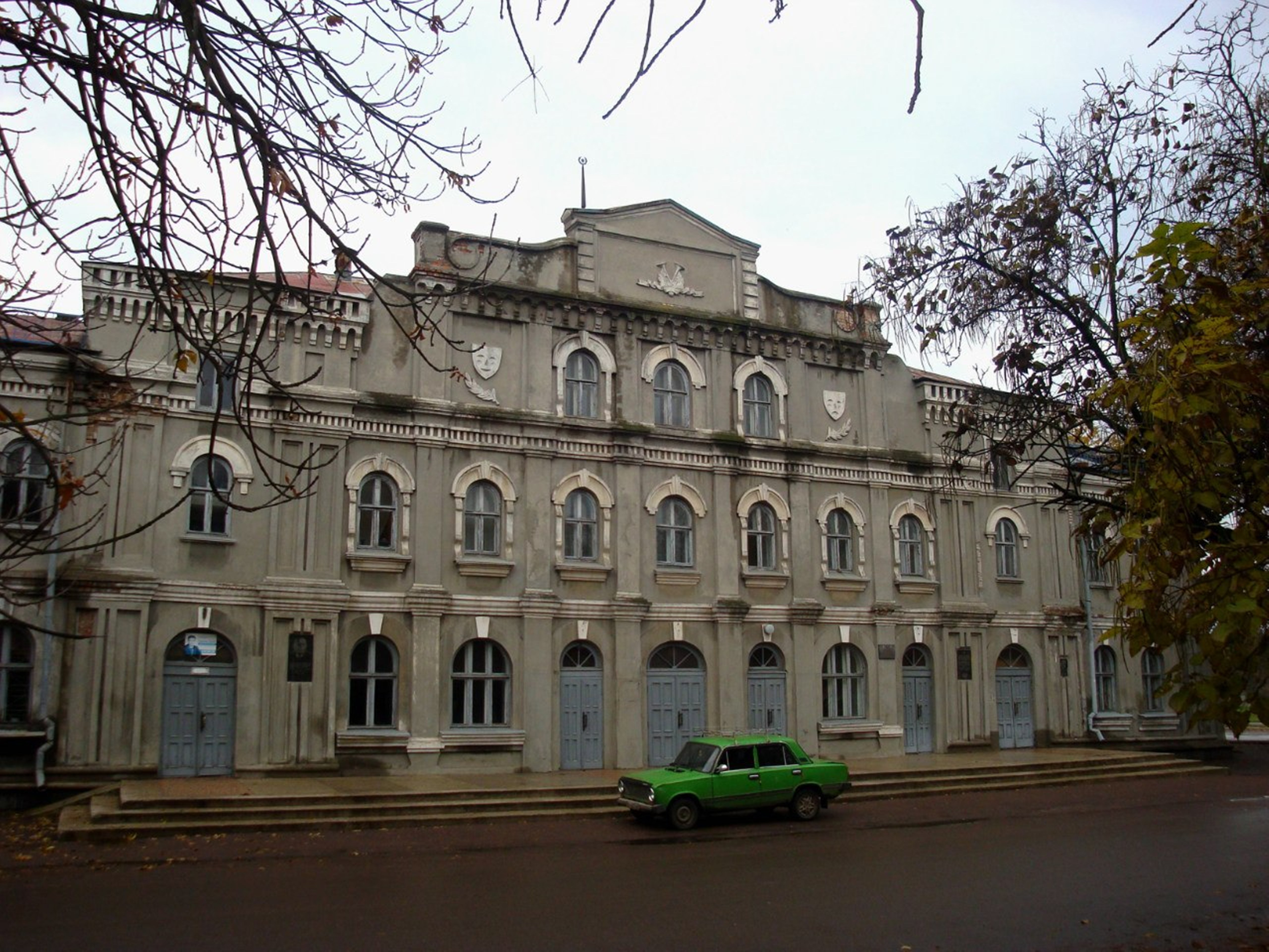 Театр, в якому працював видатний український актор Г.П. Юра, Олександрія, вул. 6 Грудня, 2